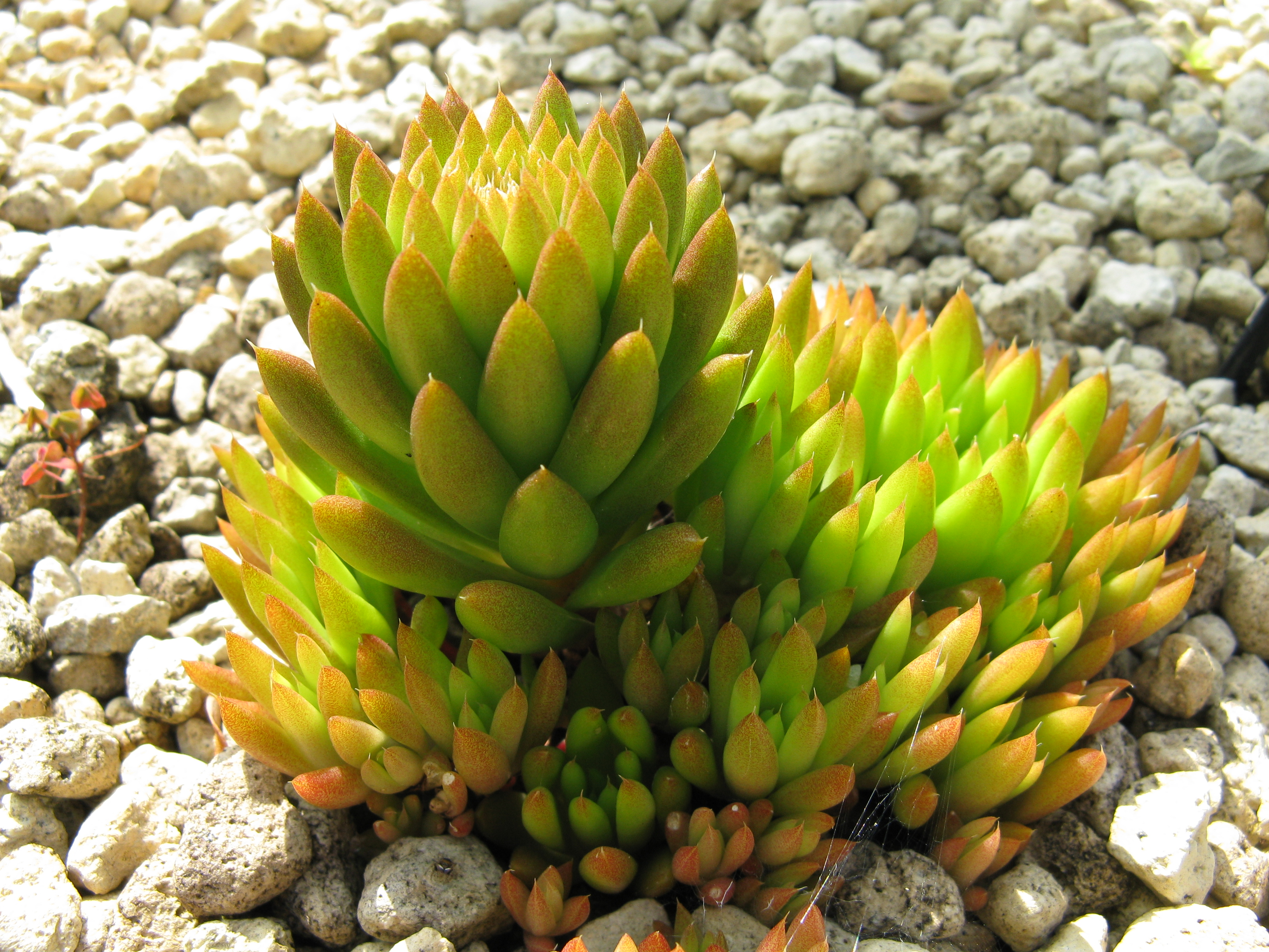 Orostachys japonica